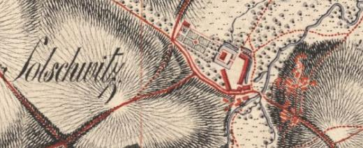 Sollschwitz auf einem Sächsischen Meilenblatt von 1804, Norden ist rechts; Meilenblätter von Sachsen (1780–1806). Aufnahmeblätter der von 1780 bis 1806 durchgeführten topographischen Landesaufnahme von Sachsen. Diese wurde unter F. L. Aster (1732–1804) vorgenommen.